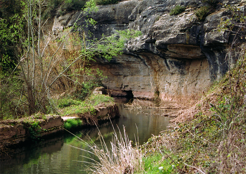 Imatge dels primers metres del canal de la resclosa dels Campassos, amb el forat d'entrada al túnel.